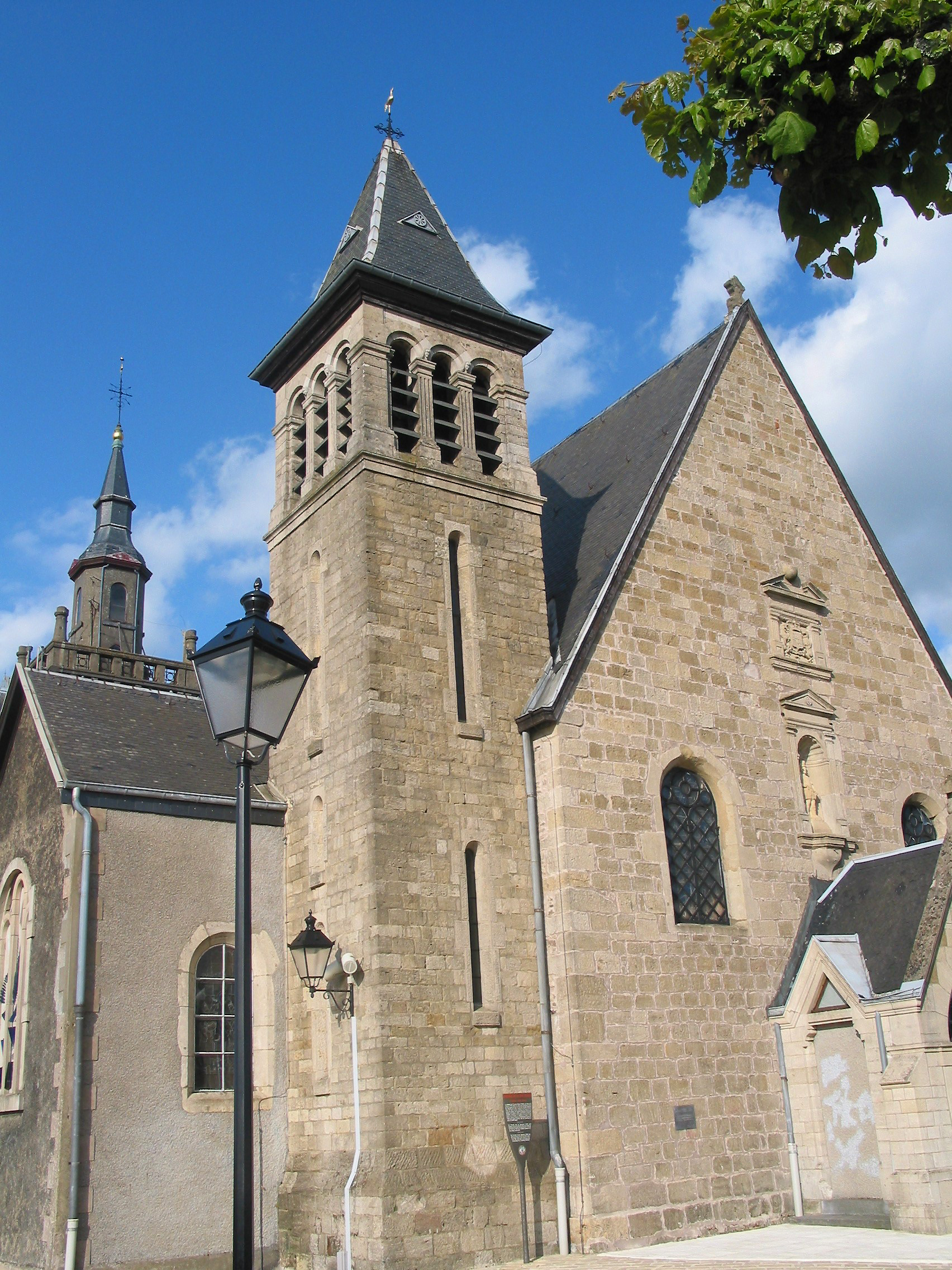 Arlon (Belgique) : l’église Saint-Donat (XVIIe siècle).